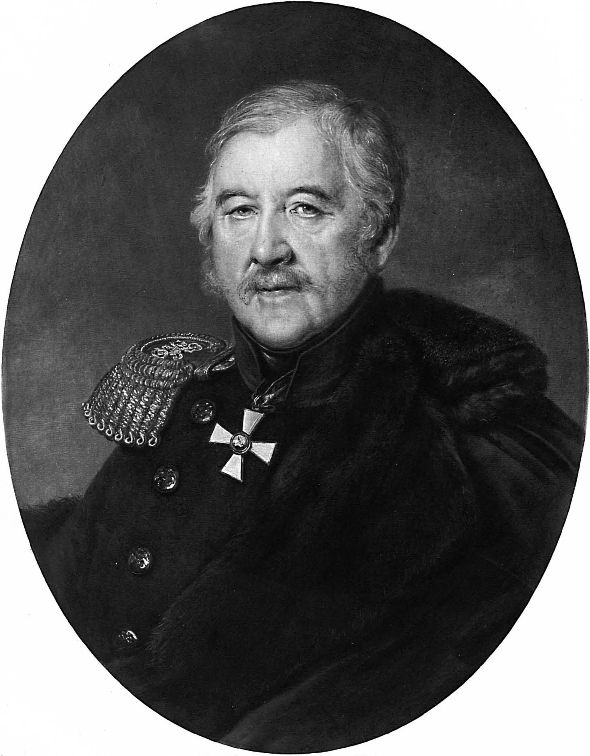 Князь Иван Леонтьевич Шаховской